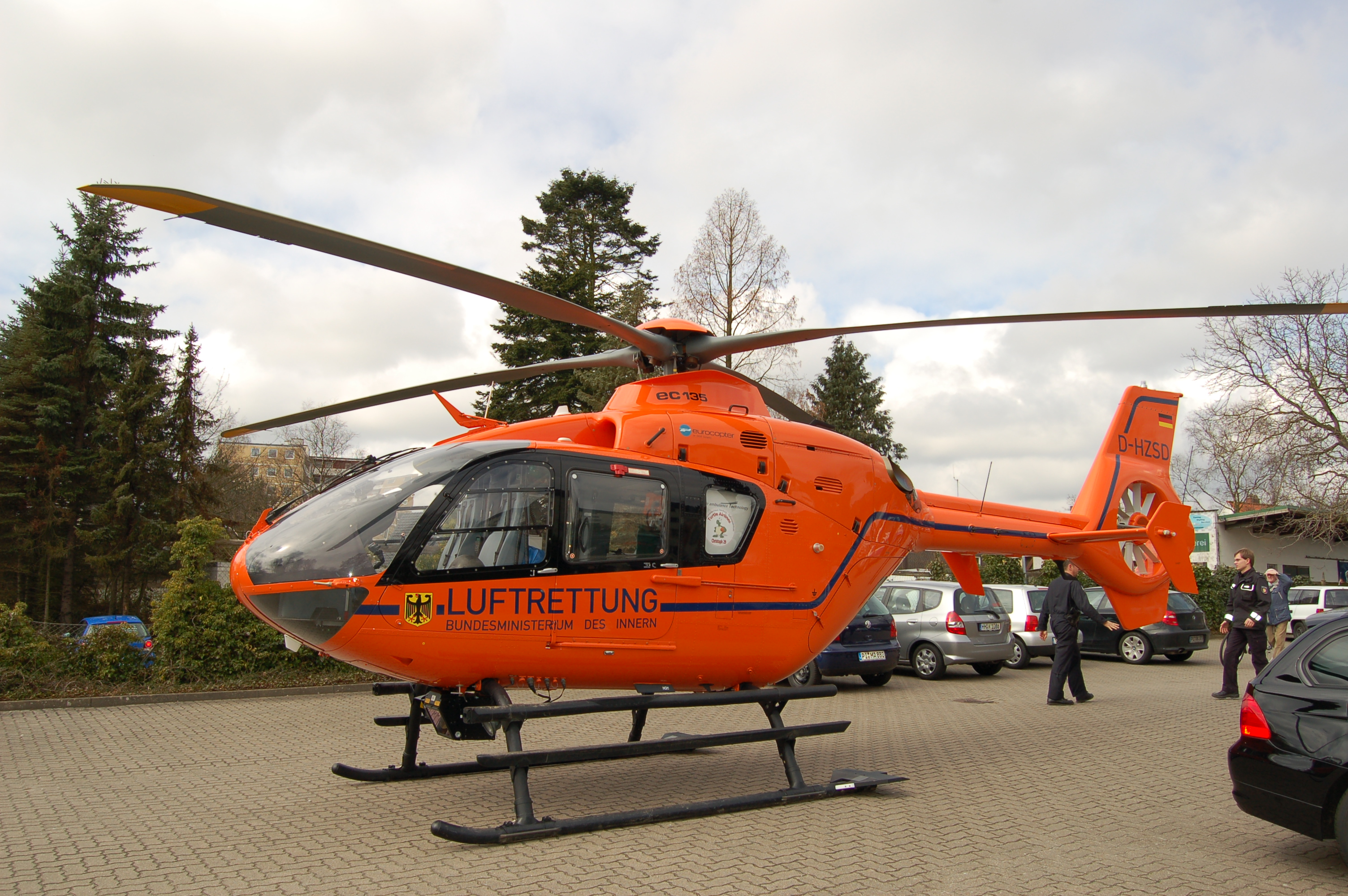 Rettungshubschrauber 'Christoph 4' (stationiert in Hannover) bei einem Einsatz in Uetersen. Kennung: D-HZSD